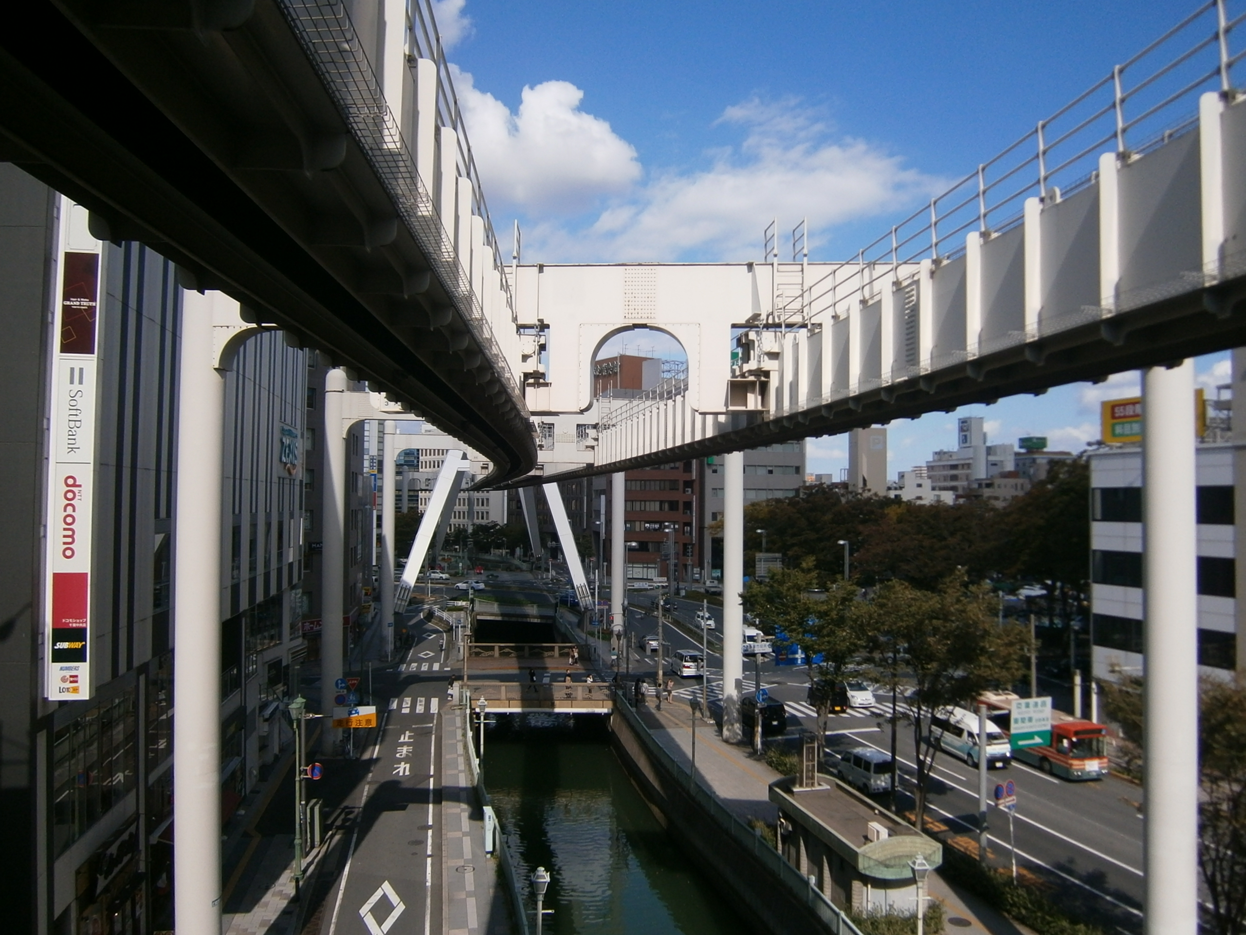 2 Chome Fujimi, Chūō-ku, Chiba-shi, Chiba-ken 260-0015, Japan